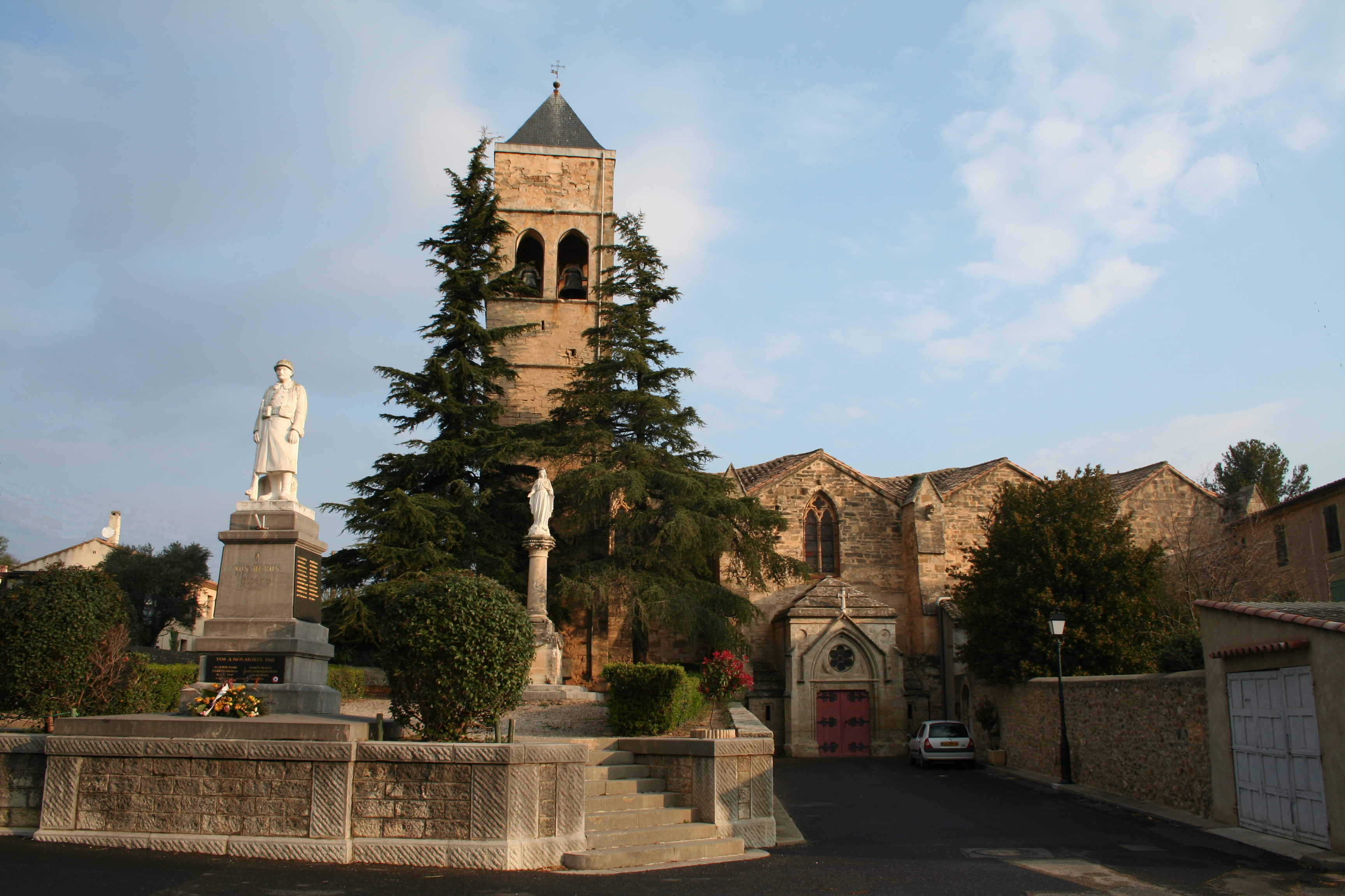 Roujan (Hérault) - église Saint-Laurent - monument aux morts.